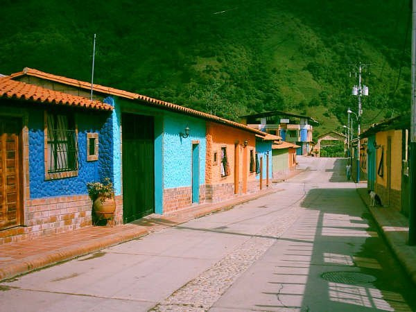 fachada